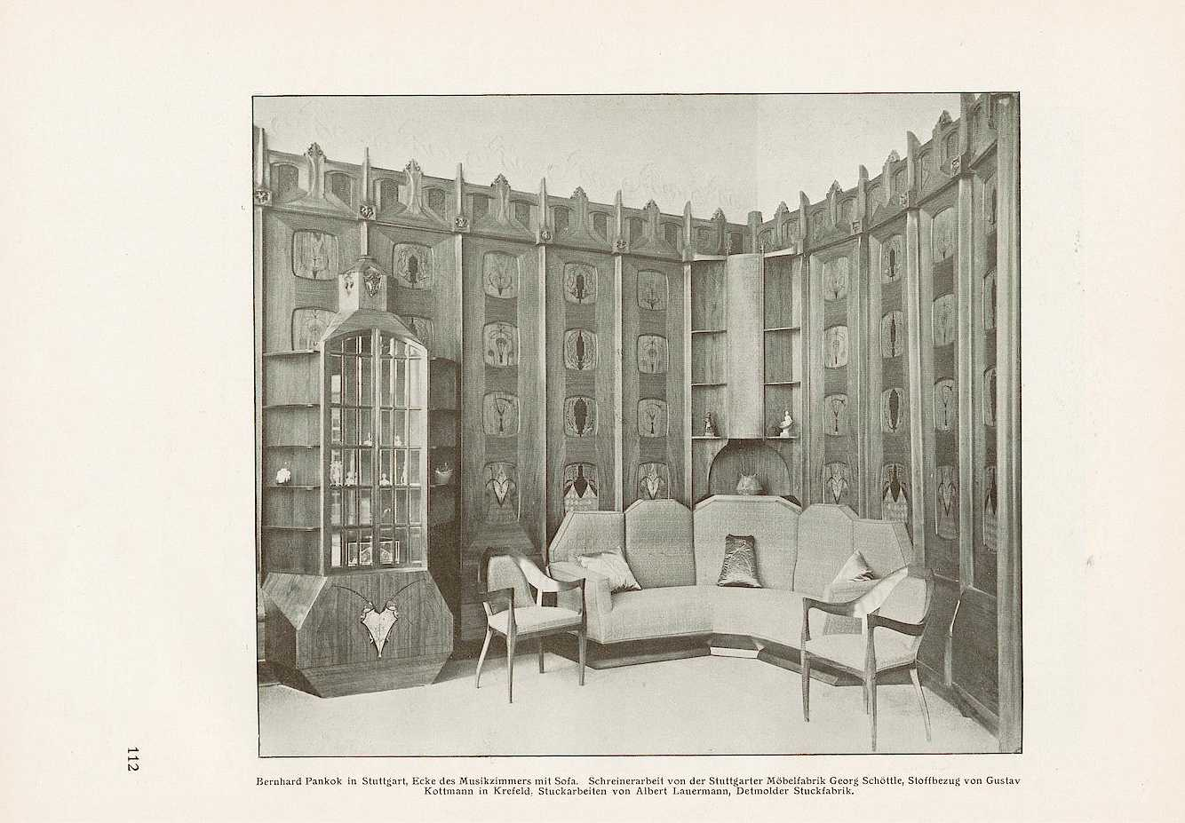 Siehe Bildunsterschrift.